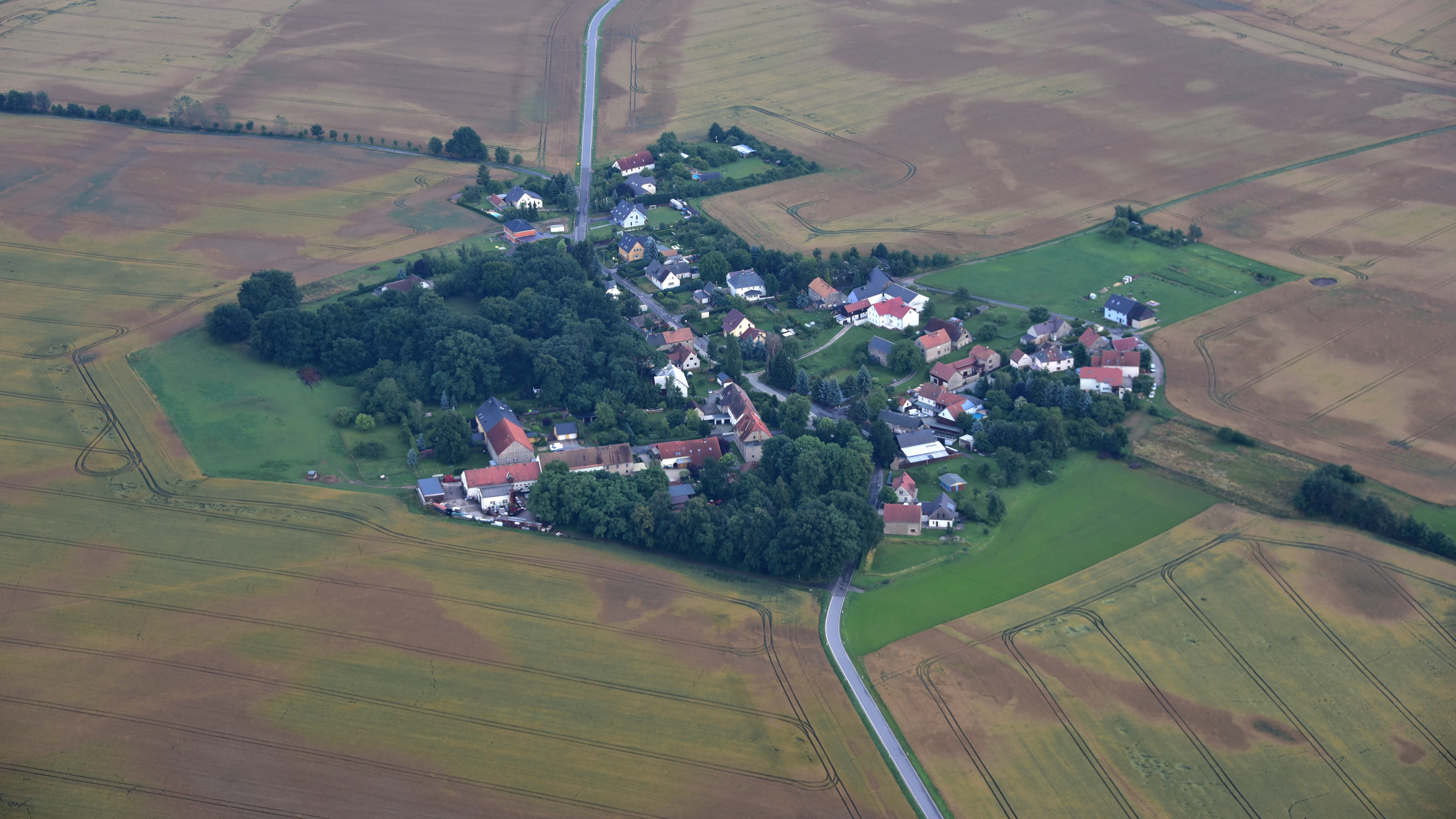 Bornitz (Radibor), Luftaufnahme (2017) Hornjoserbsce: Powětrowy wobraz Boranec (2017)